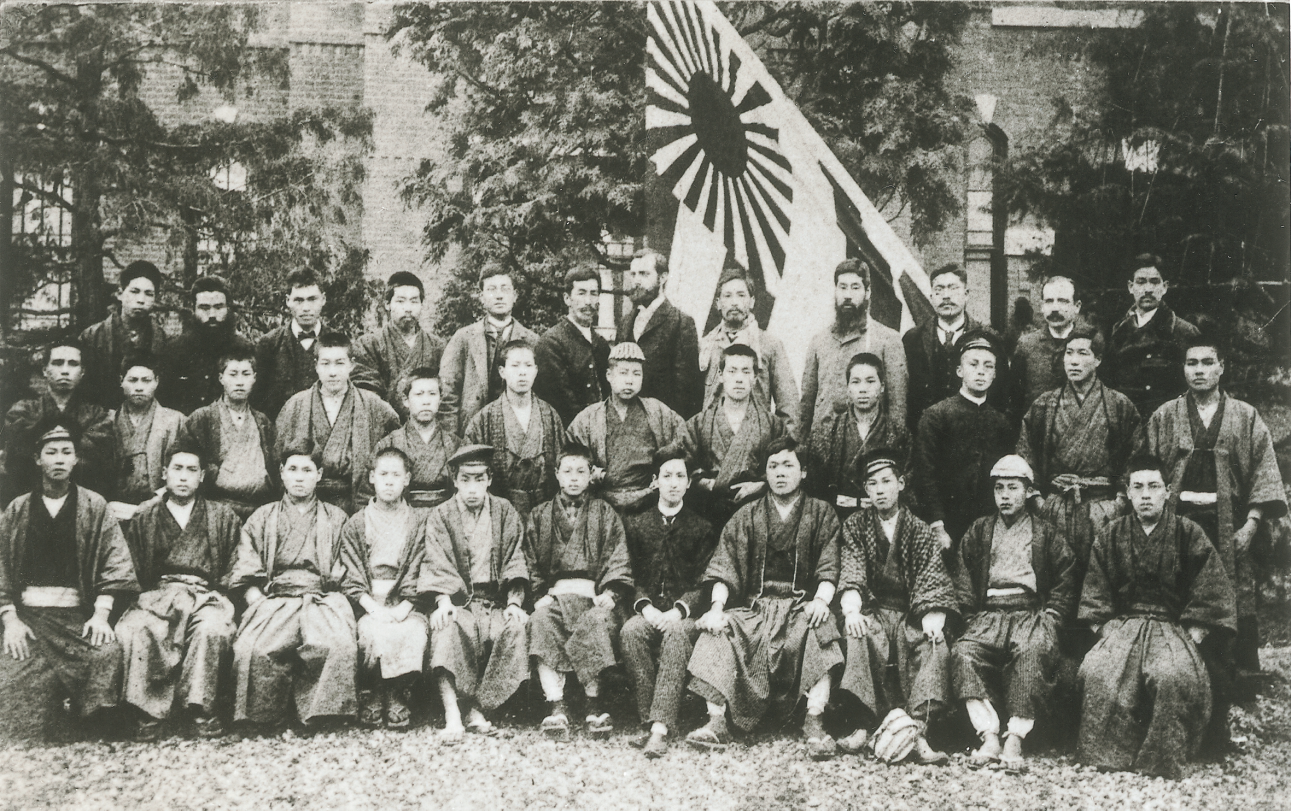 明治26年3月 奥太一郎先生送別会記念 東北学院予科3年生および教員35名 前列右から5人目が奥太一郎、前列右から3人目は押川方存（春浪）